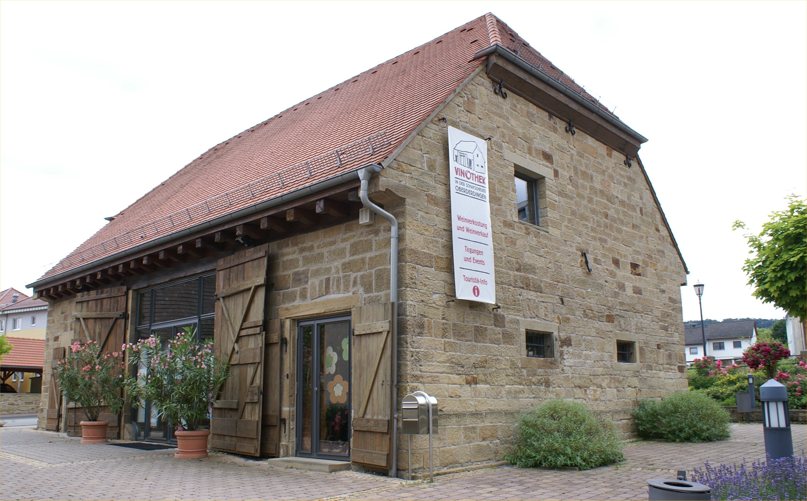 Die aus dem Jahr 1867 stammende Schafscheuer in Oberderdingen ist heute Bürger- und Kulturhaus. Hier befindet sich auch die Touristikinformation